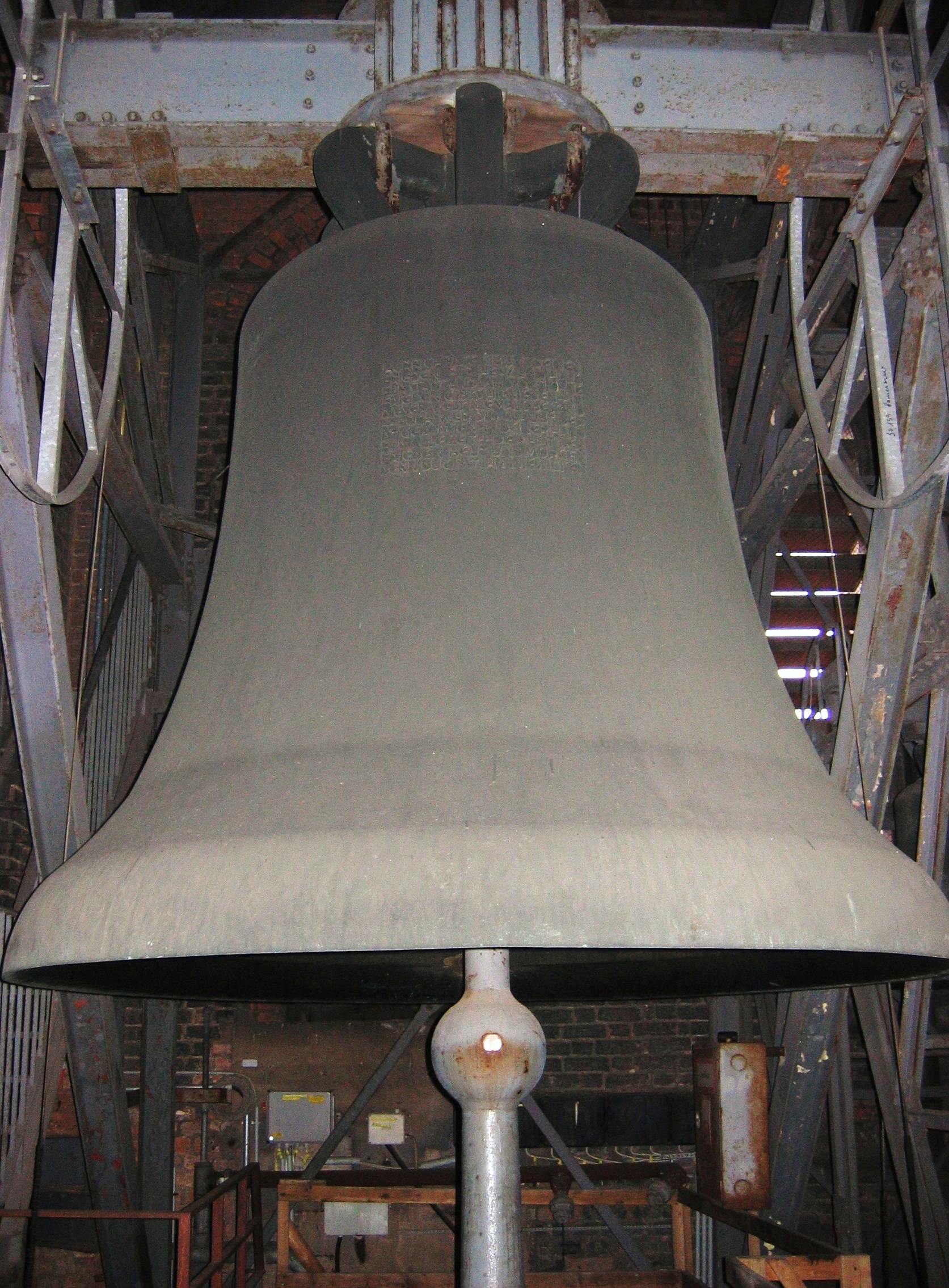 Große Christusglocke der Hannoveraner Marktkirche